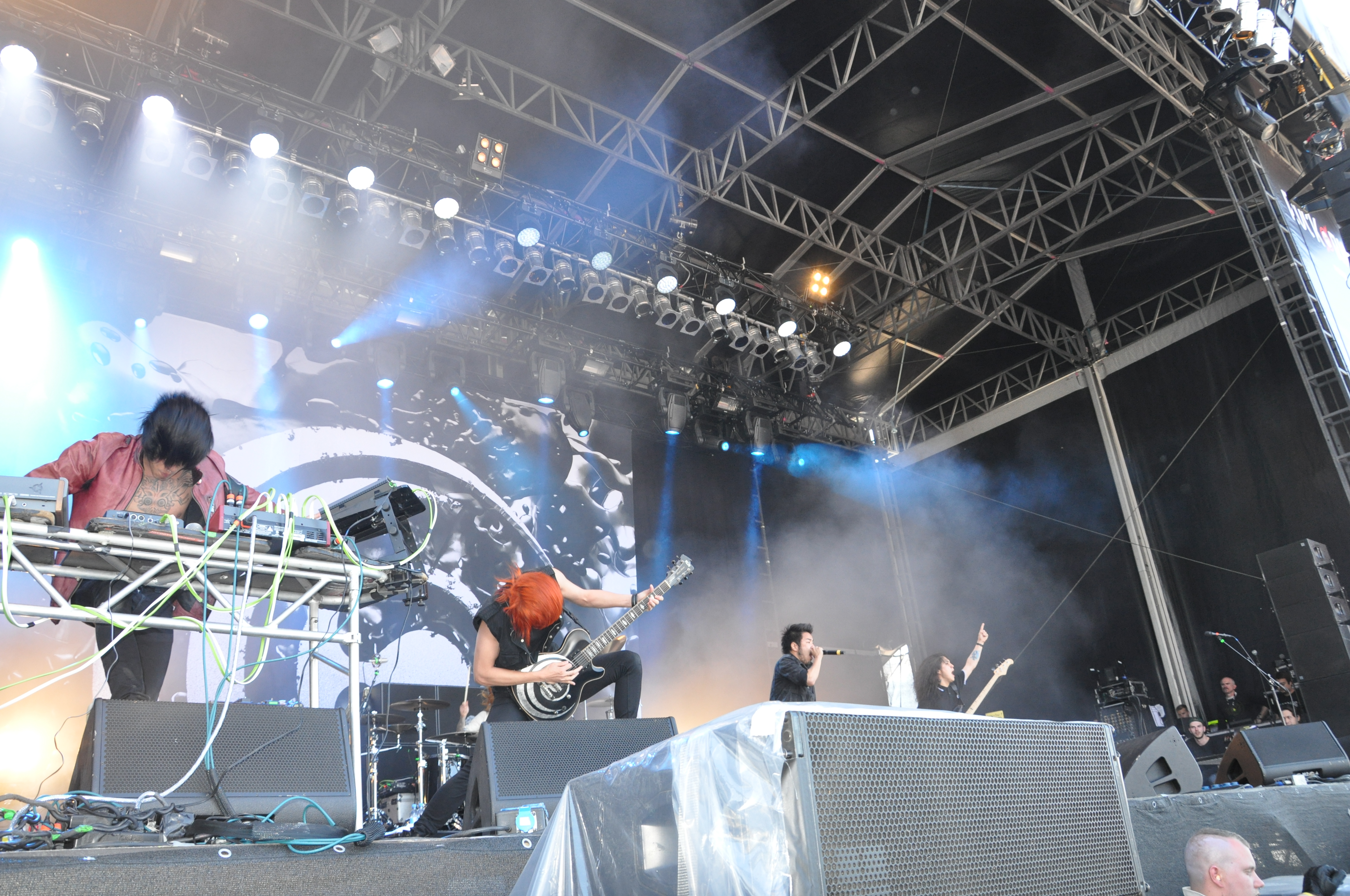 Crossfaith auf der Clubstage bei Rock am Ring 2014